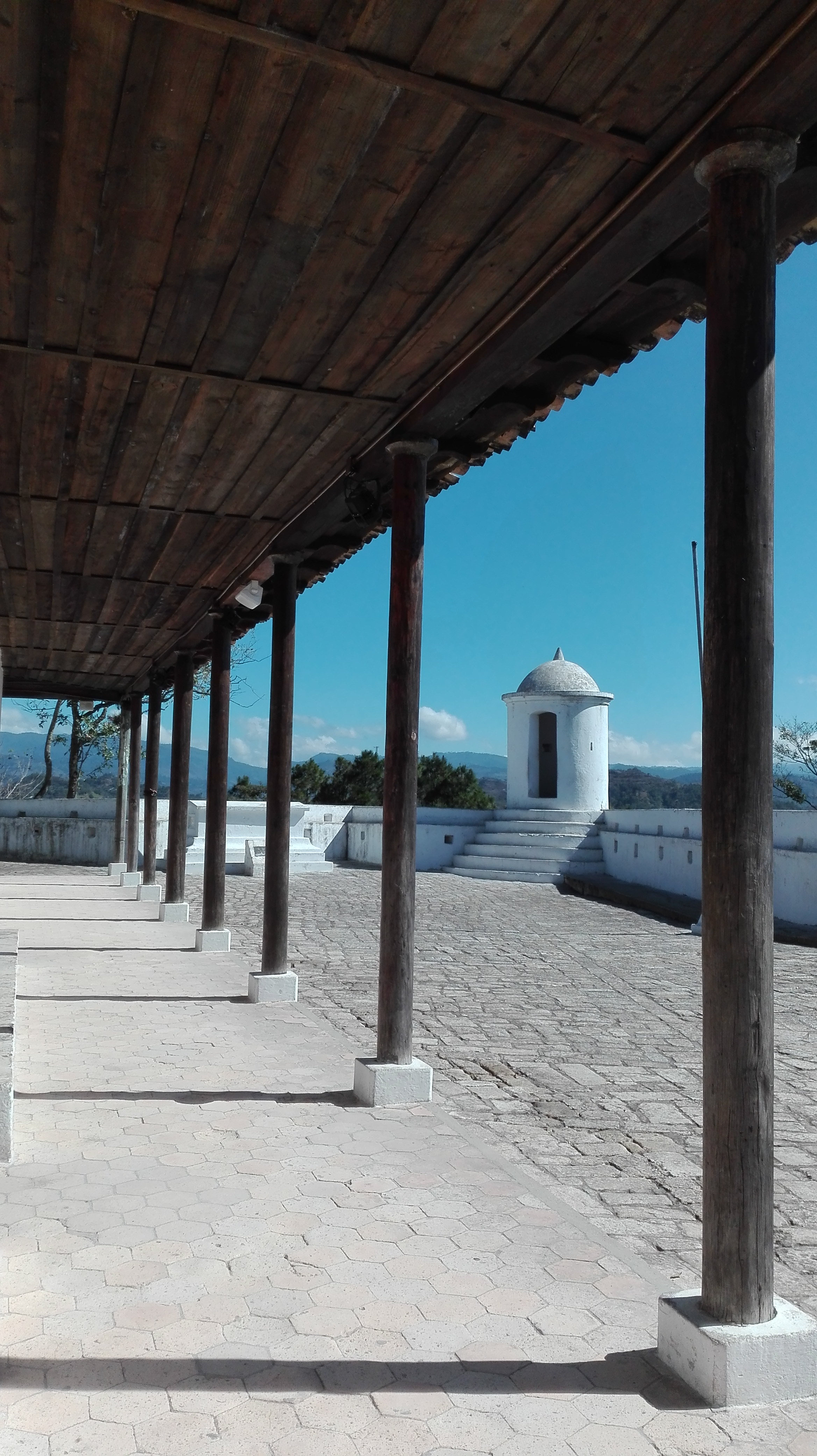 Fuerte San Cristóbal, departamento de Lempira, ciudad de Gracias, Honduras.